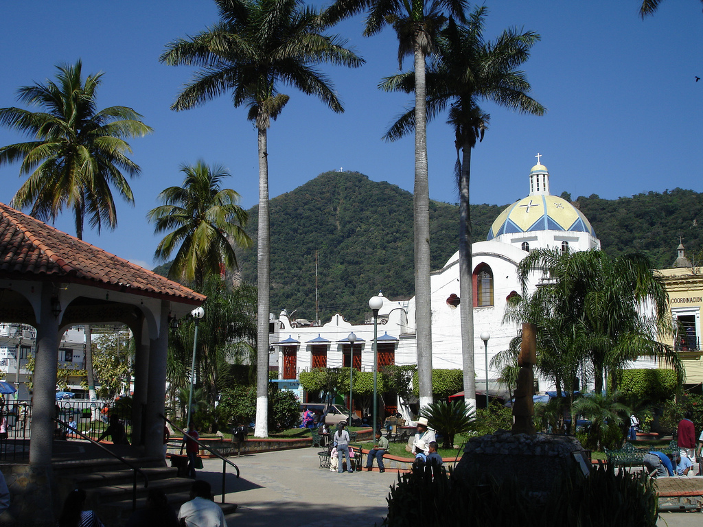 Plaza Juarez, Cerro de la Cruz, Parroquia de San Juan Bautista, tamazunchale S.L.P.